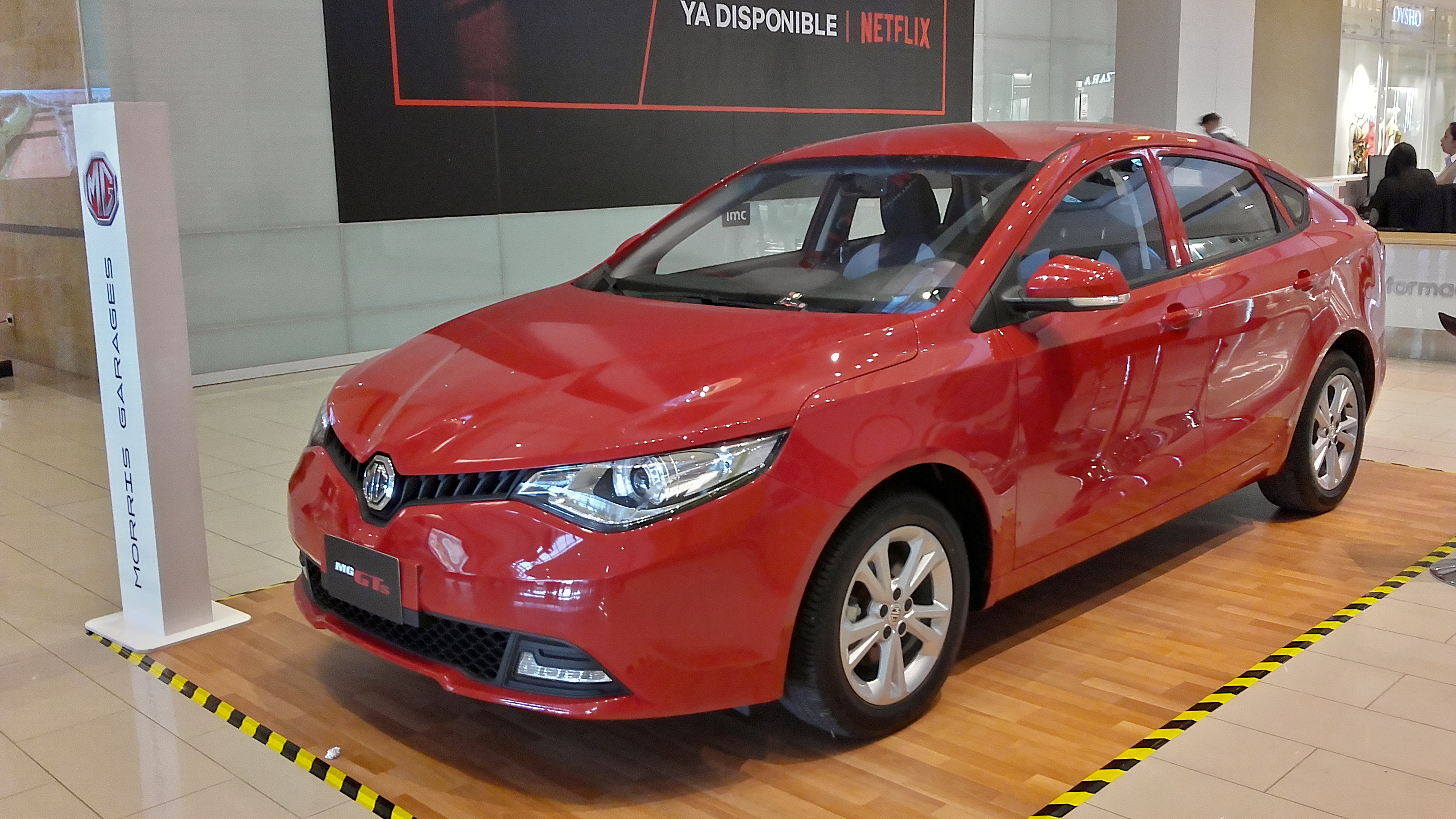 kdkfnfncbv